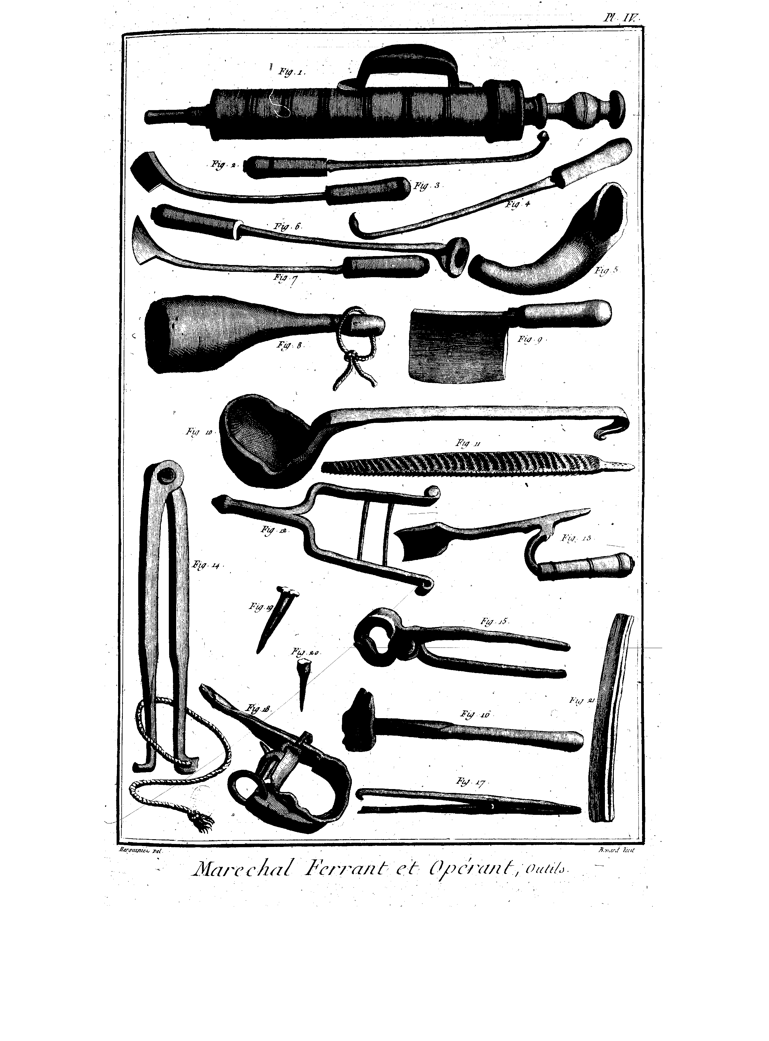 Planches de l'Encyclopédie de Diderot et d'Alembert, volume 6